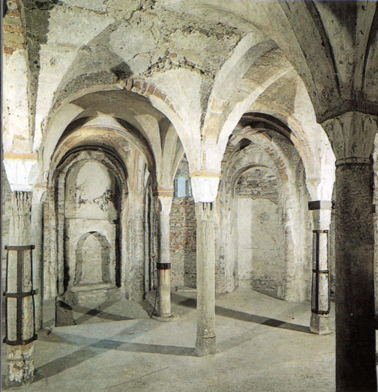 illustrazione in pd-italia da: paolo diacono, storia dei longobardi, milano, electa 1985 Licensing Categoria:Immagini d'arte longobarda